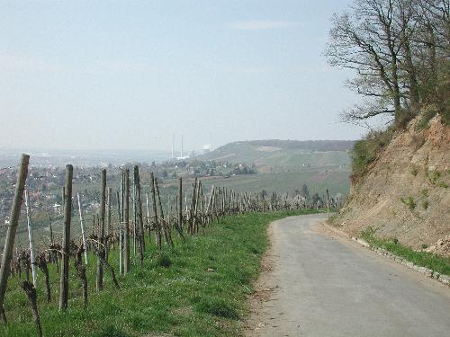 Der Keuperweg in Heilbronn. Ein Geologischer Lehrpfad mit insgesamt 13 Informationstafeln zu den direkt am Weg liegenden Aufschlüssen. Ausgangspunkt ist das Jägerhaus im Osten von Heilbronn.